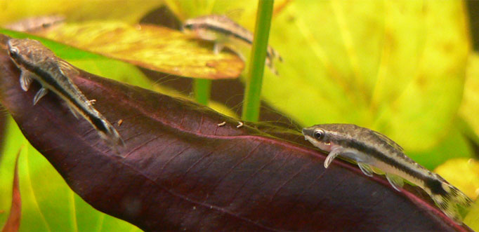 Otocinclus vittatus, Längsstreifen-Ohrgitterharnischwels